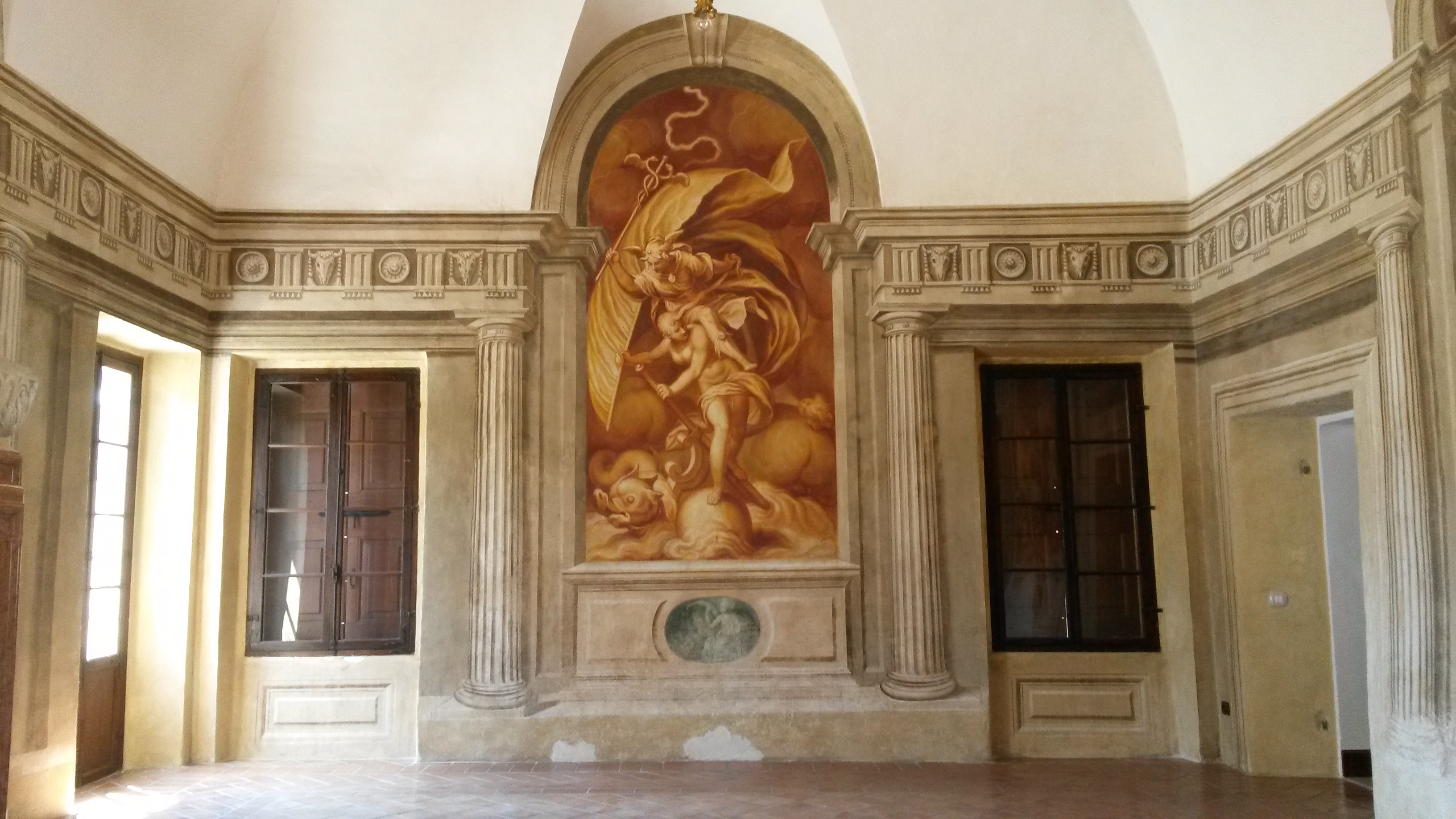 Sala Rossa. Peristilio dorico e "Mercurio guida la Fortuna", affreschi di Paolo Farinati, 1590 circa (restaurati nel 2016).